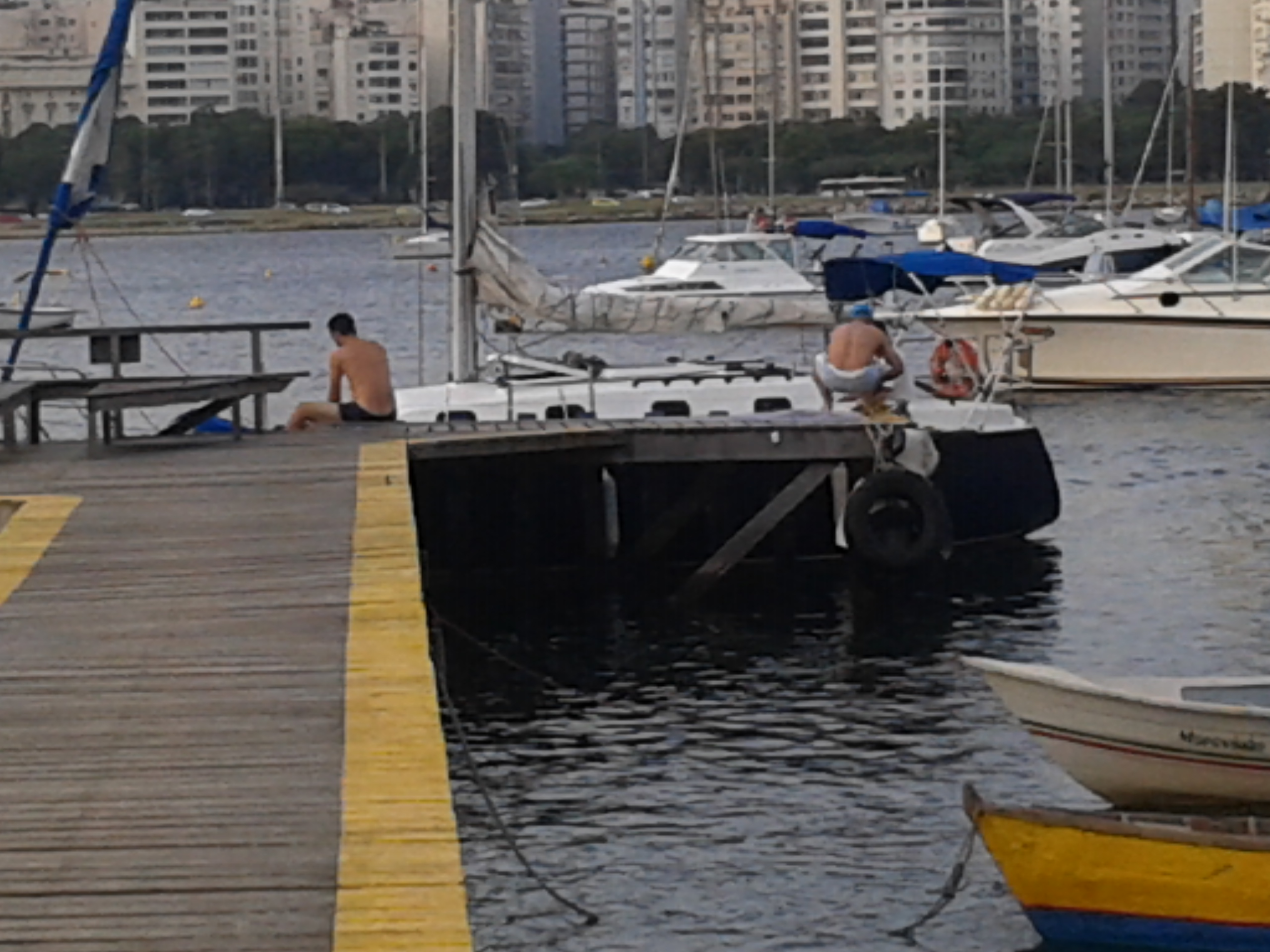 Baia de Guanabara - Rampa do Clube de Regatas Guanabara - Botafogo - Rio de Janeiro - Brazil